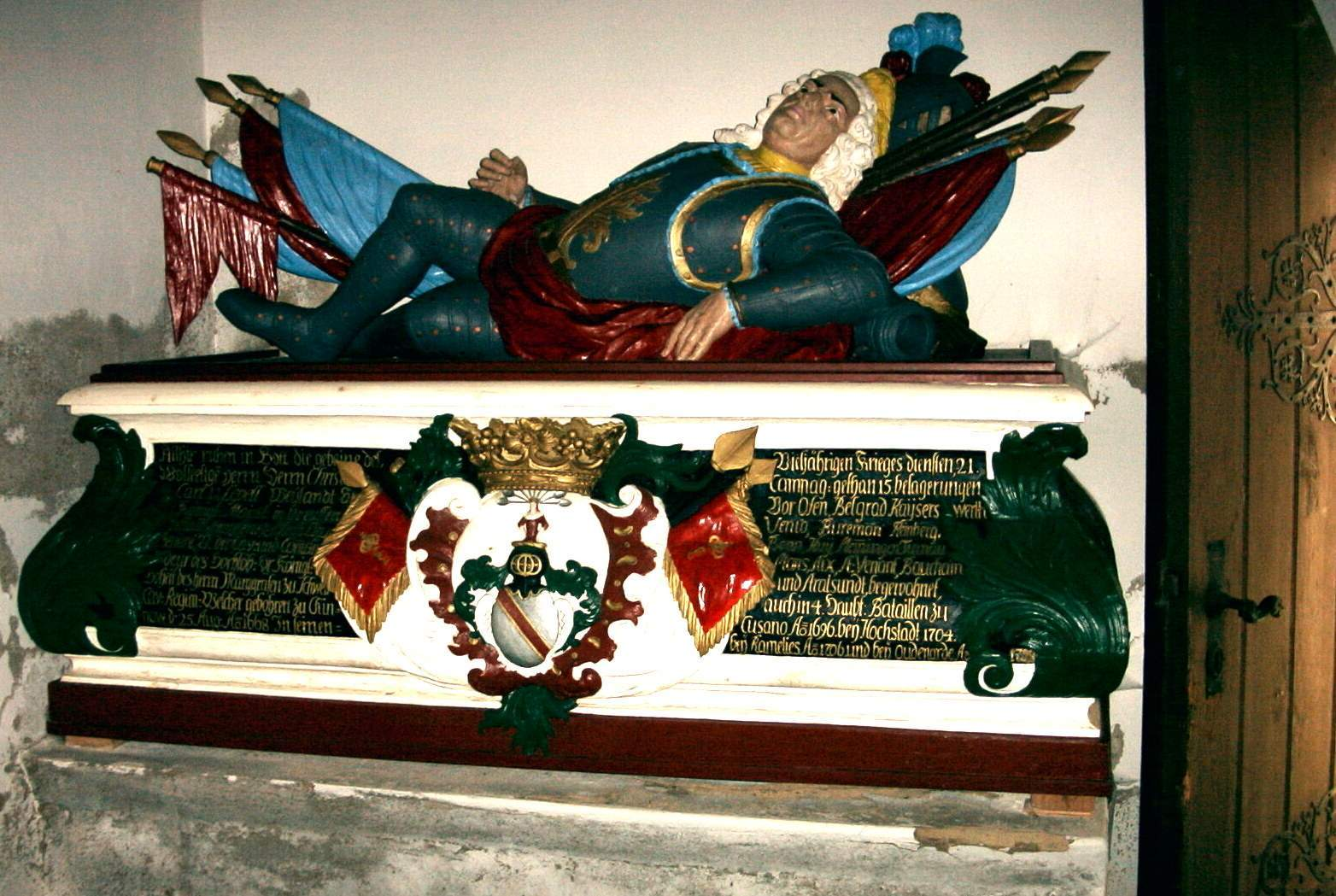 Sakophag Christian C. v. Lepel in Kirche Netzelkow